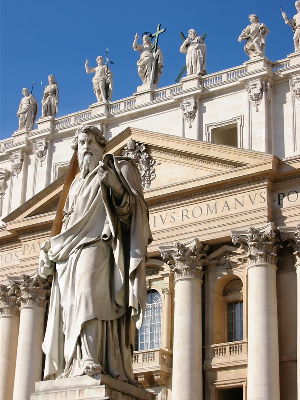 Statue de Saint Paul, Place Saint Pierre Rome Italie